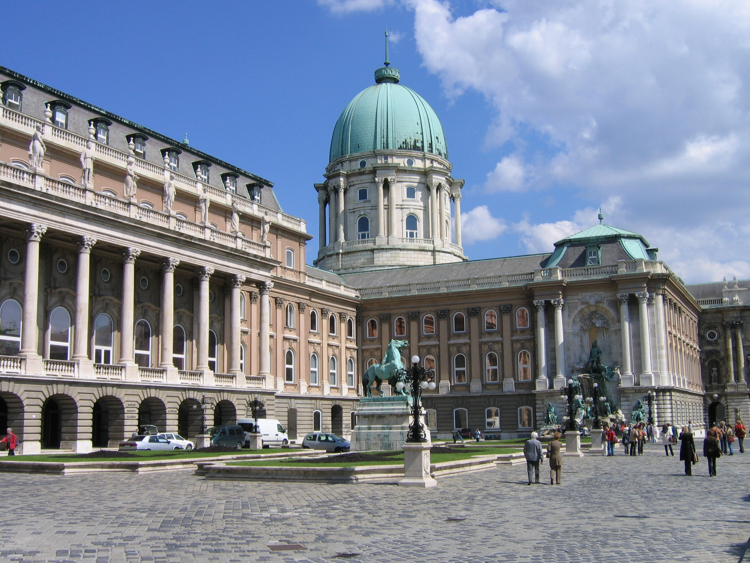 Buda Castle (Budai Vár) Budapest, Hungary